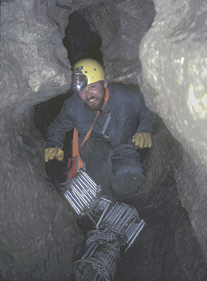 Cadomin Cave, Alberta Canada, lower series connector